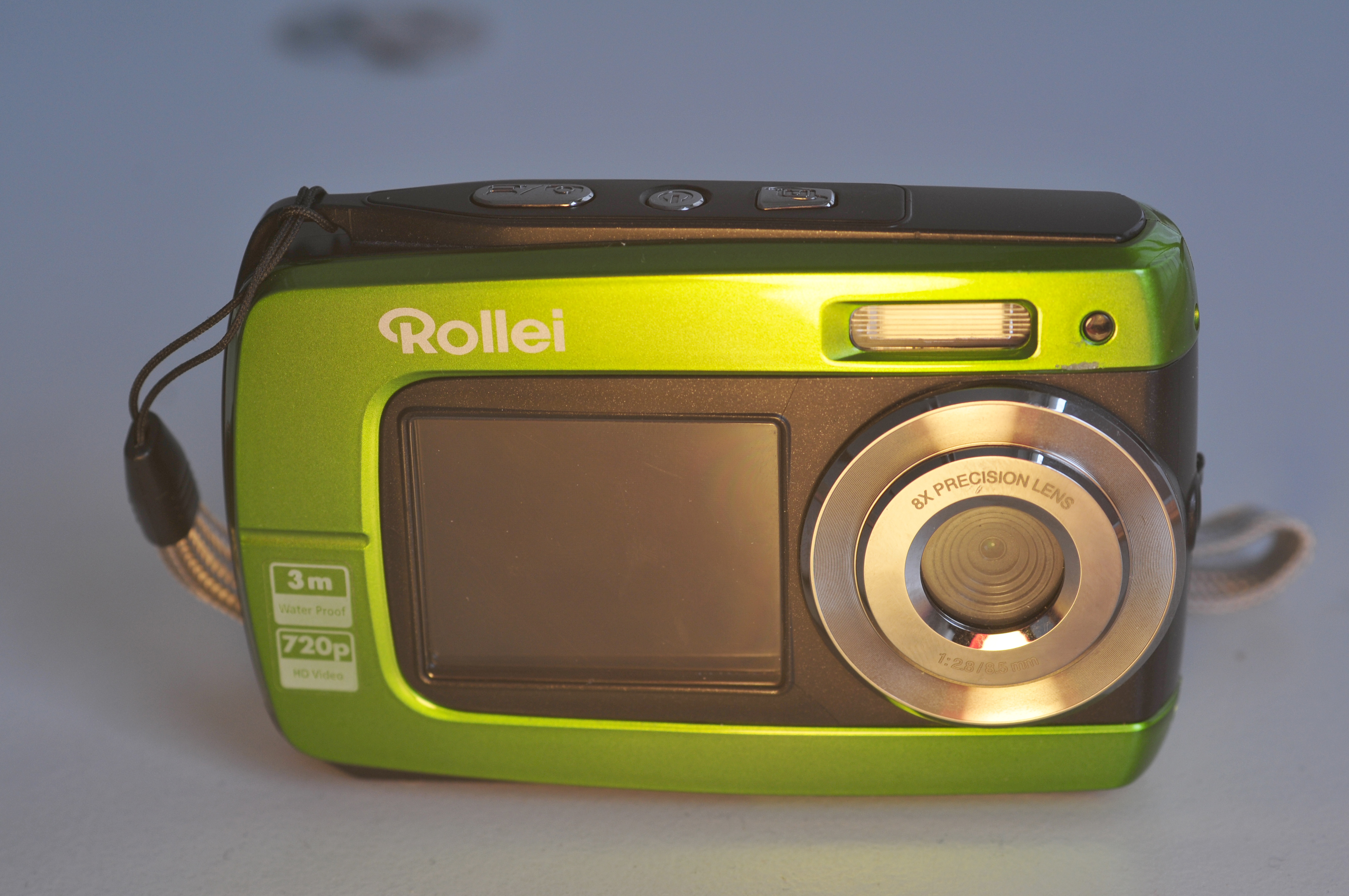 wassergeschützte Systemkamera Rollei Sportsline 62